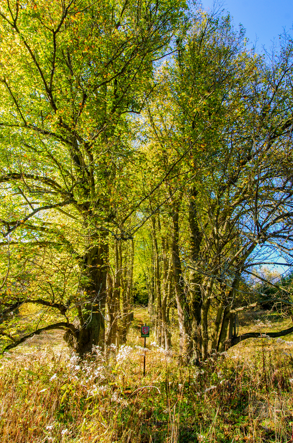 památné stromy - Křížové stromořadí, okres Sokolov